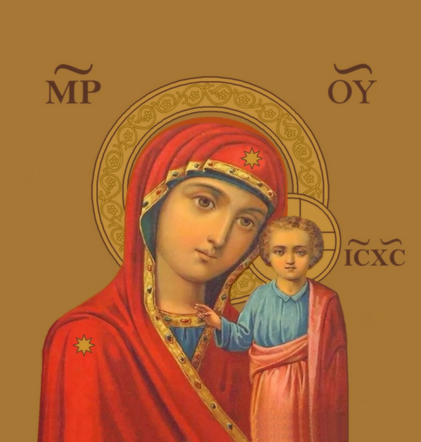 Imagen Latina de Nuestra Señora de Kazan